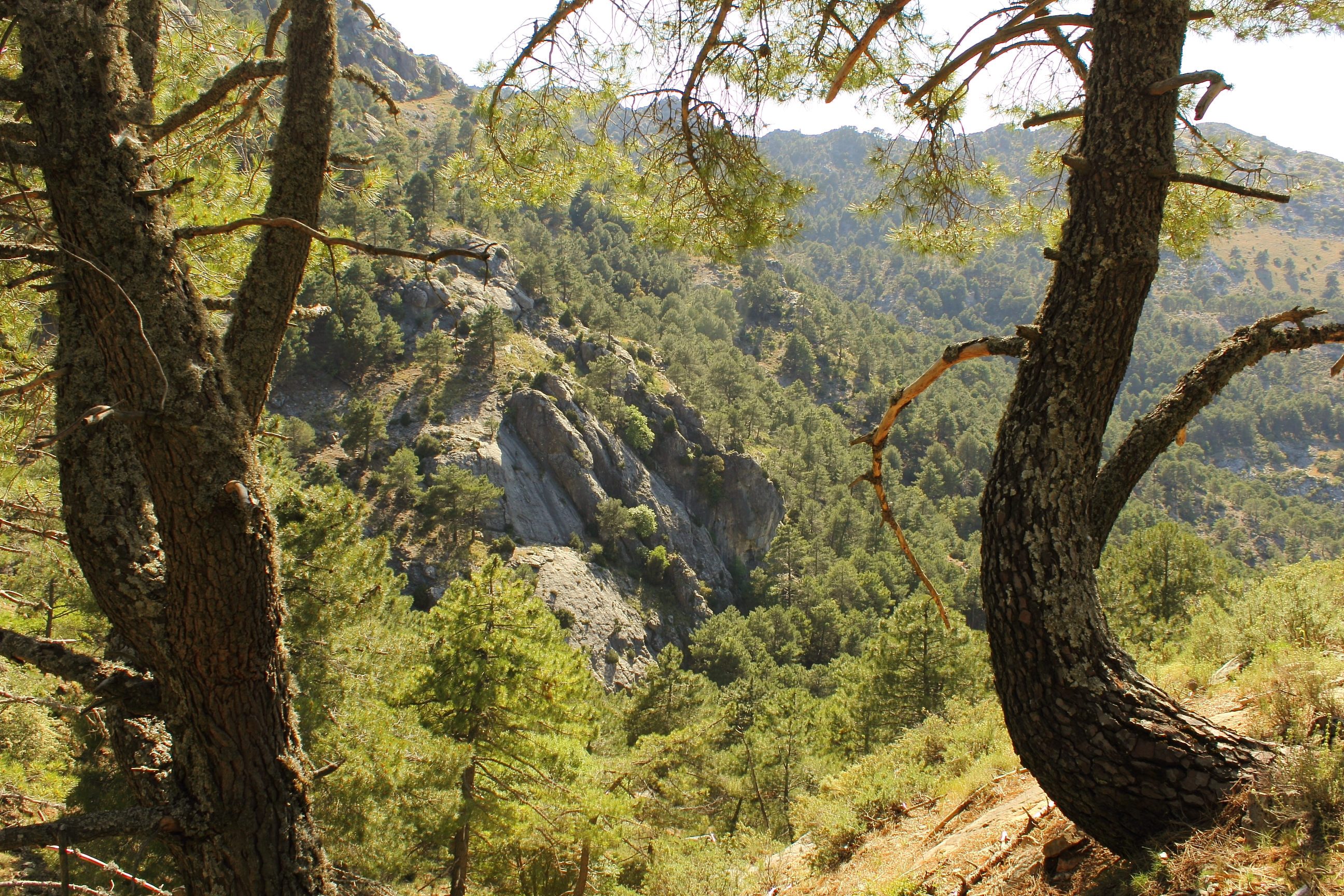 Sierra de Cazorla, península ibérica.